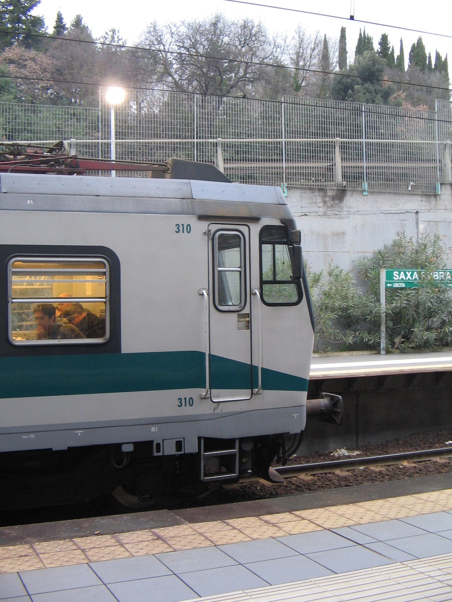 Roma, stazione Saxa Rubra della ferrovia Roma-Viterbo